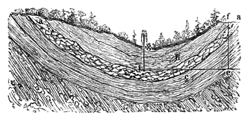 Artesischer Brunnen